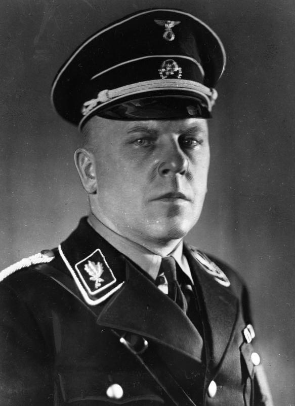 Max Amann Portrait Max Amann in der Uniform eines SS-Gruppenführers Abgebildete Personen: Amann, Max: Reichsleiter, Präsident der Reichspressekammer, Deutschland ( GND 116296666 )